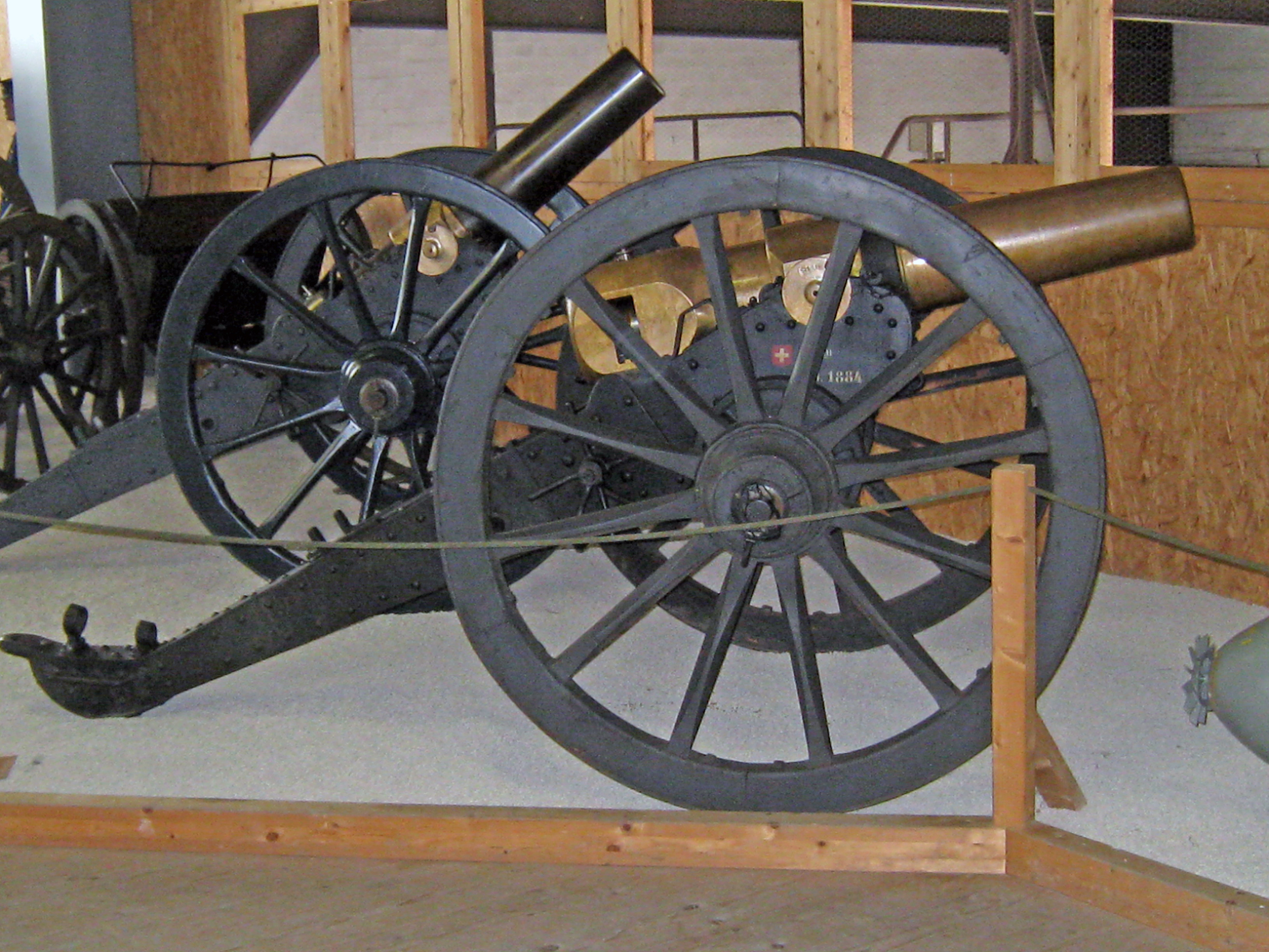 12 cm Positionsmörser 1884 im Militärmuseum Full